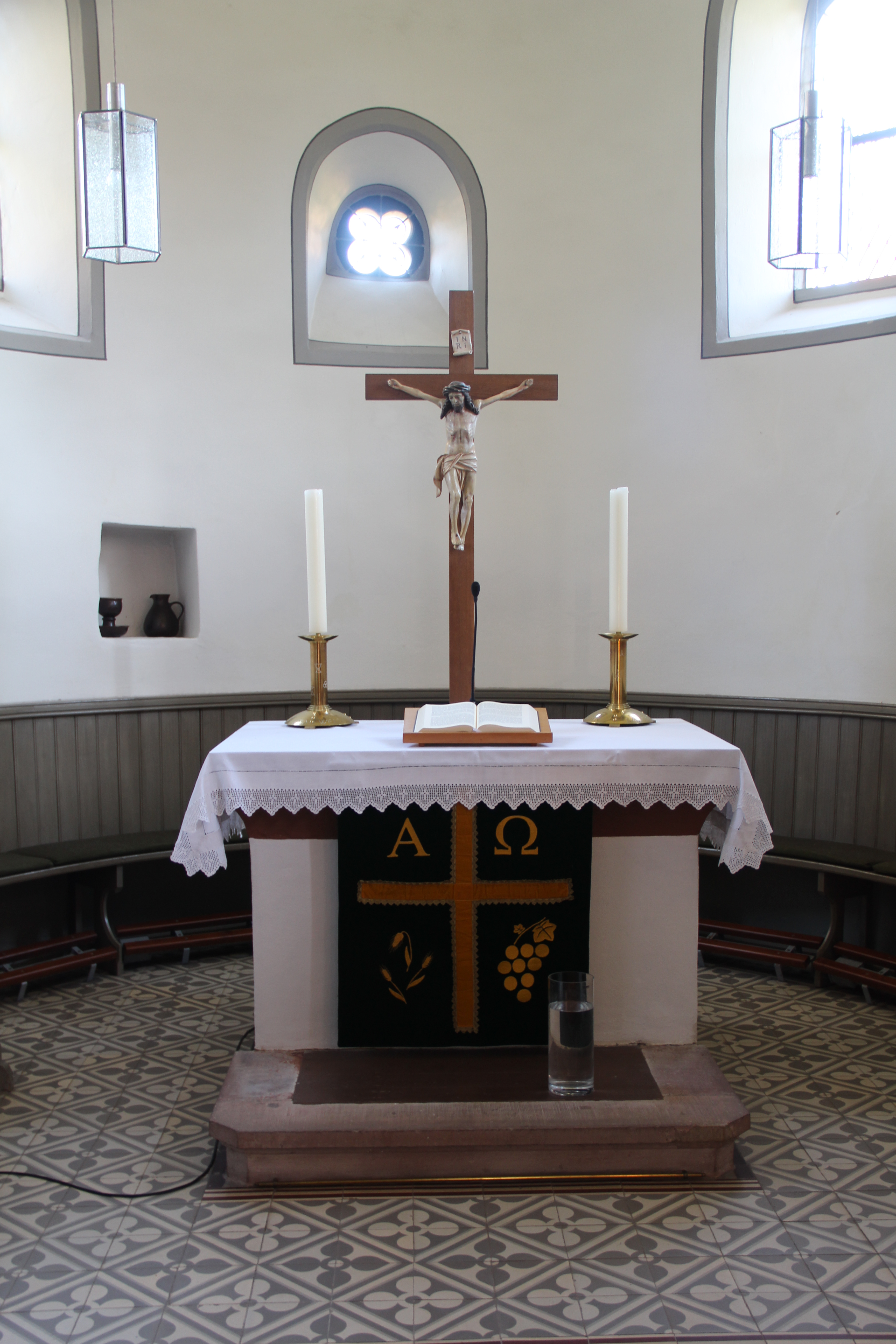 Oberwalgern